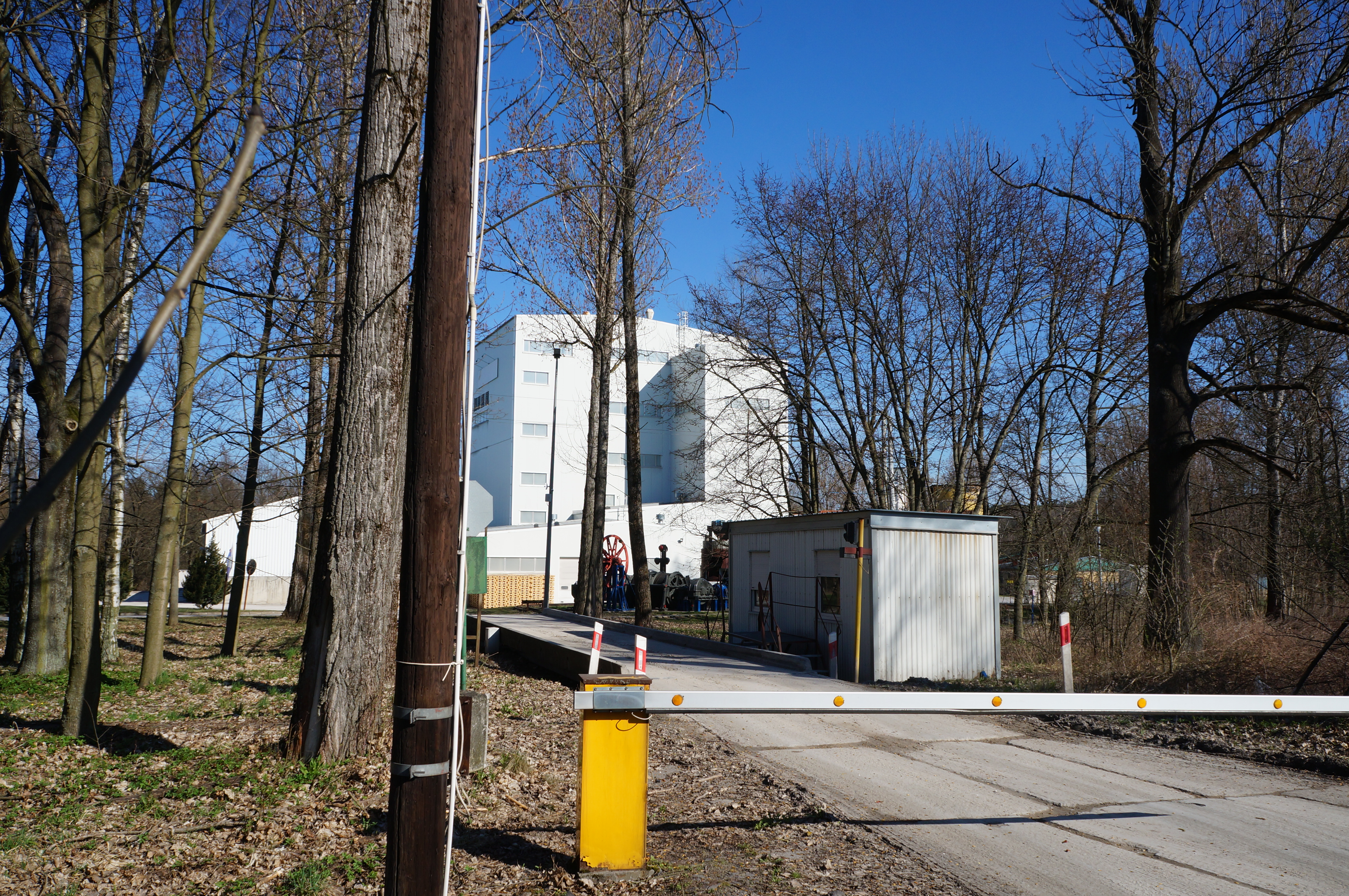 Budynki kopalni gipsu i anhydrytu